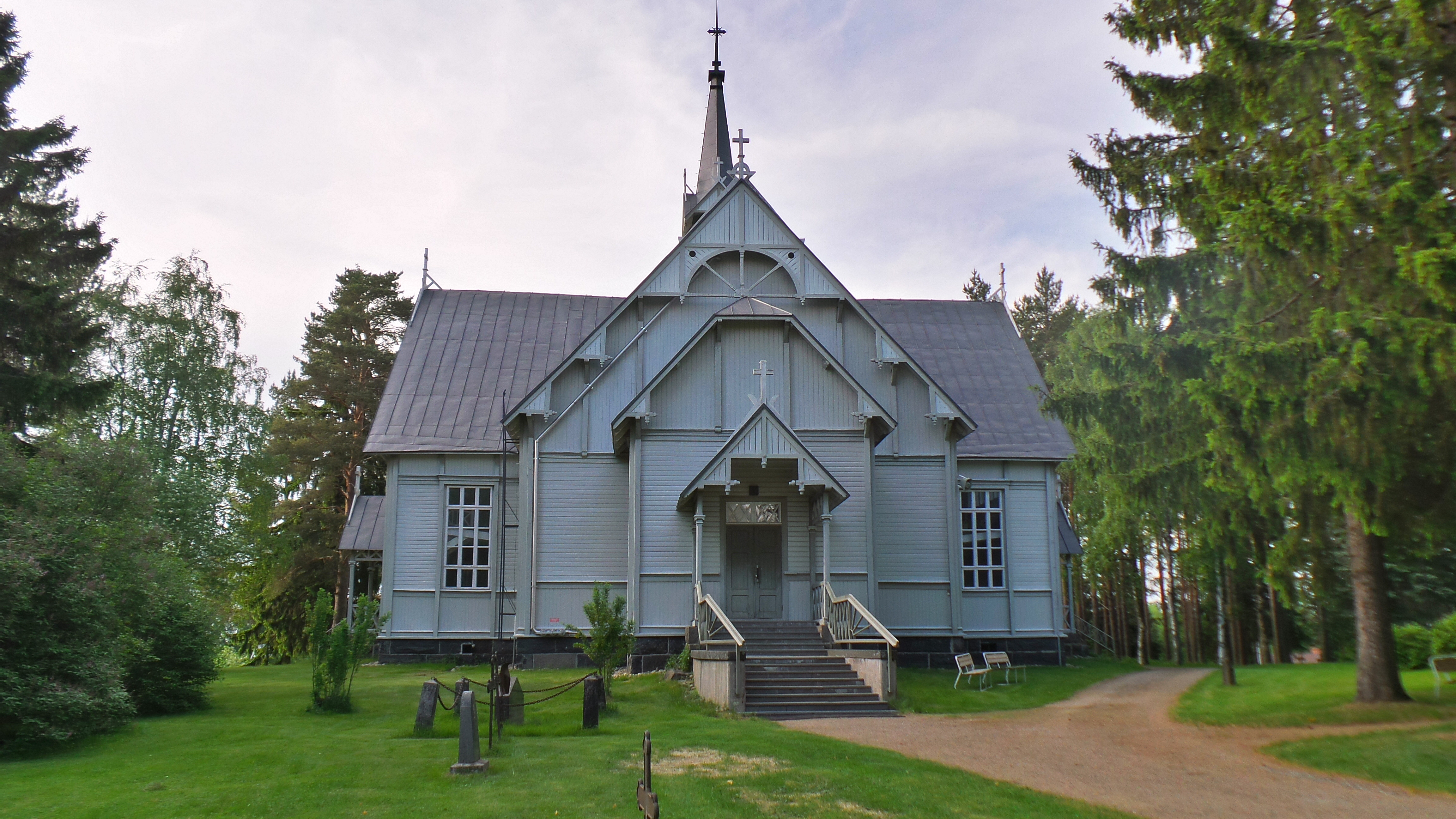 Church in Pulkkilan, Finland